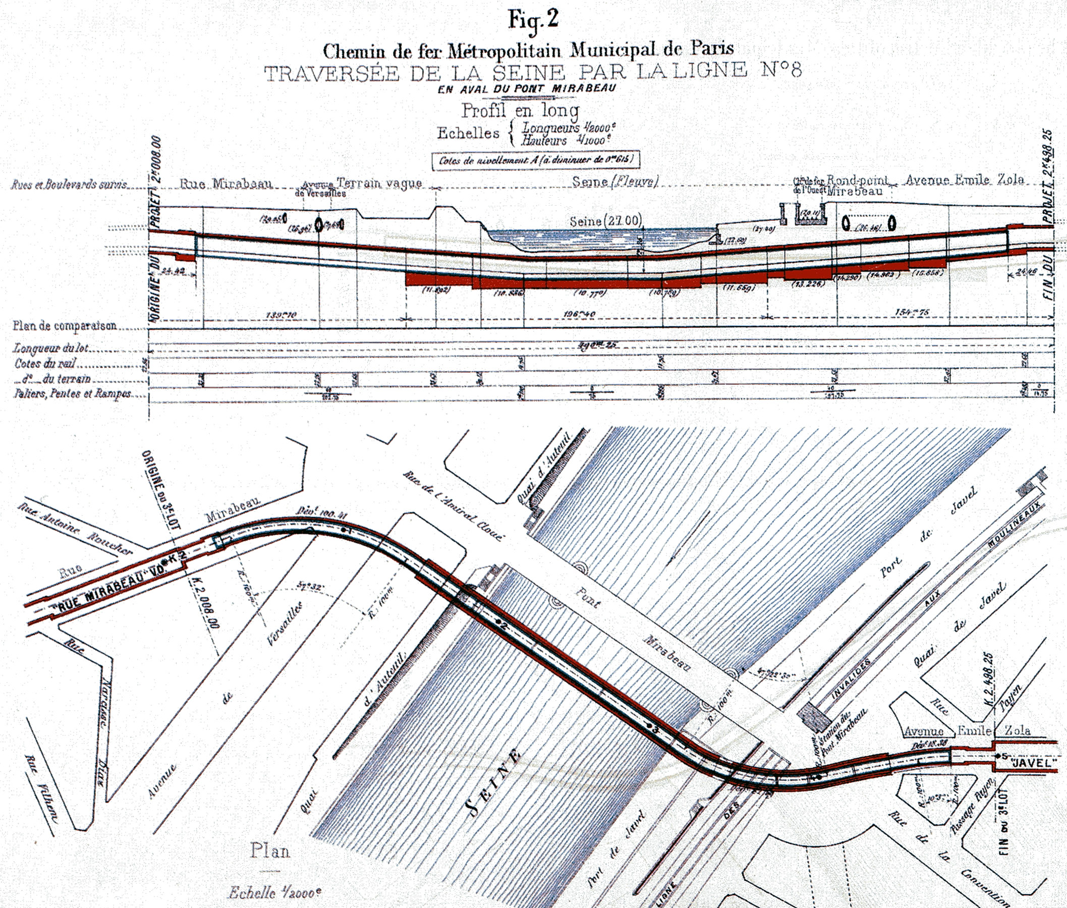 Ligne 8 du métro de Paris (actuelle ligne 10), France. Profil en long et en plan de la traversée sous-fluviale à Auteuil (pont Mirabeau).